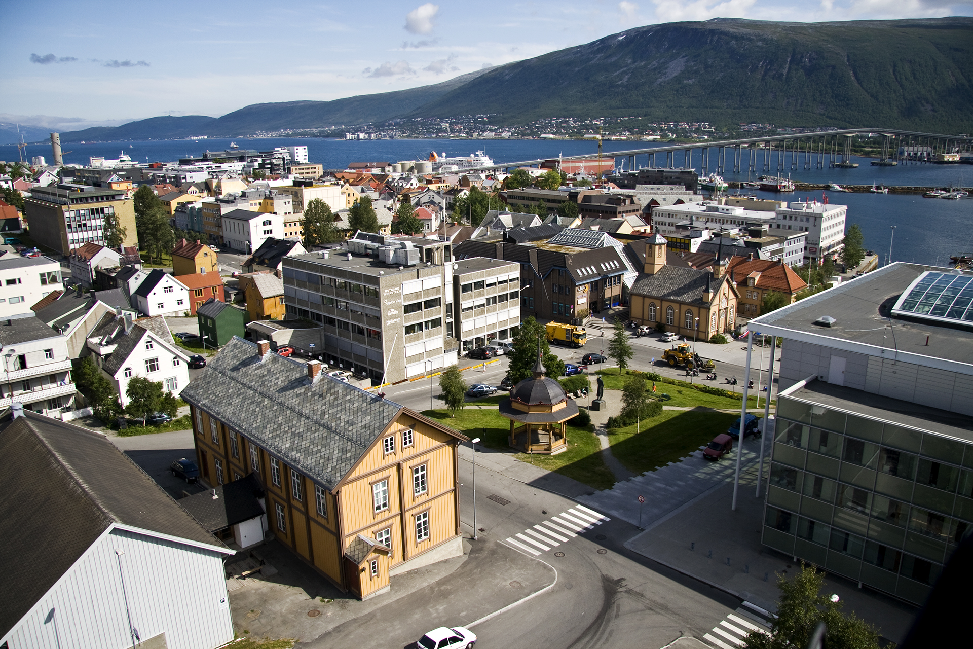 Bildet kan fritt lastes ned. Vennligst krediter fotograf.